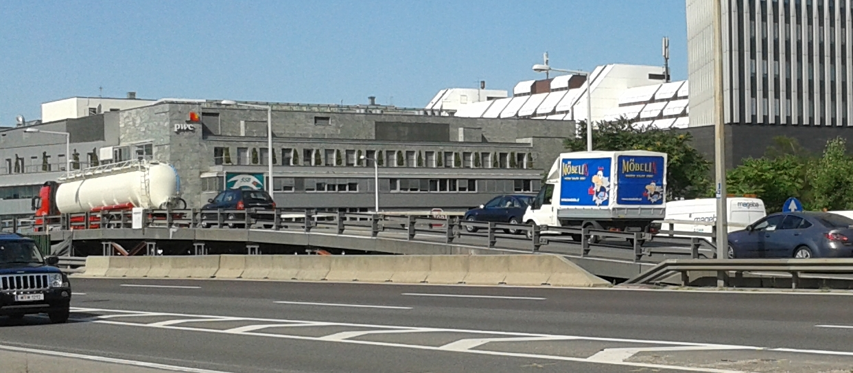 Deitsch: Überbrückung von Kurzbaustellen auf Autobahnen